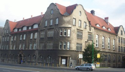 Poznań, ul. Święty Marcin 87 - dawny Ewangelicki Dom Związkowy, obecnie Akademia Muzyczna (zabytek nr A 275)